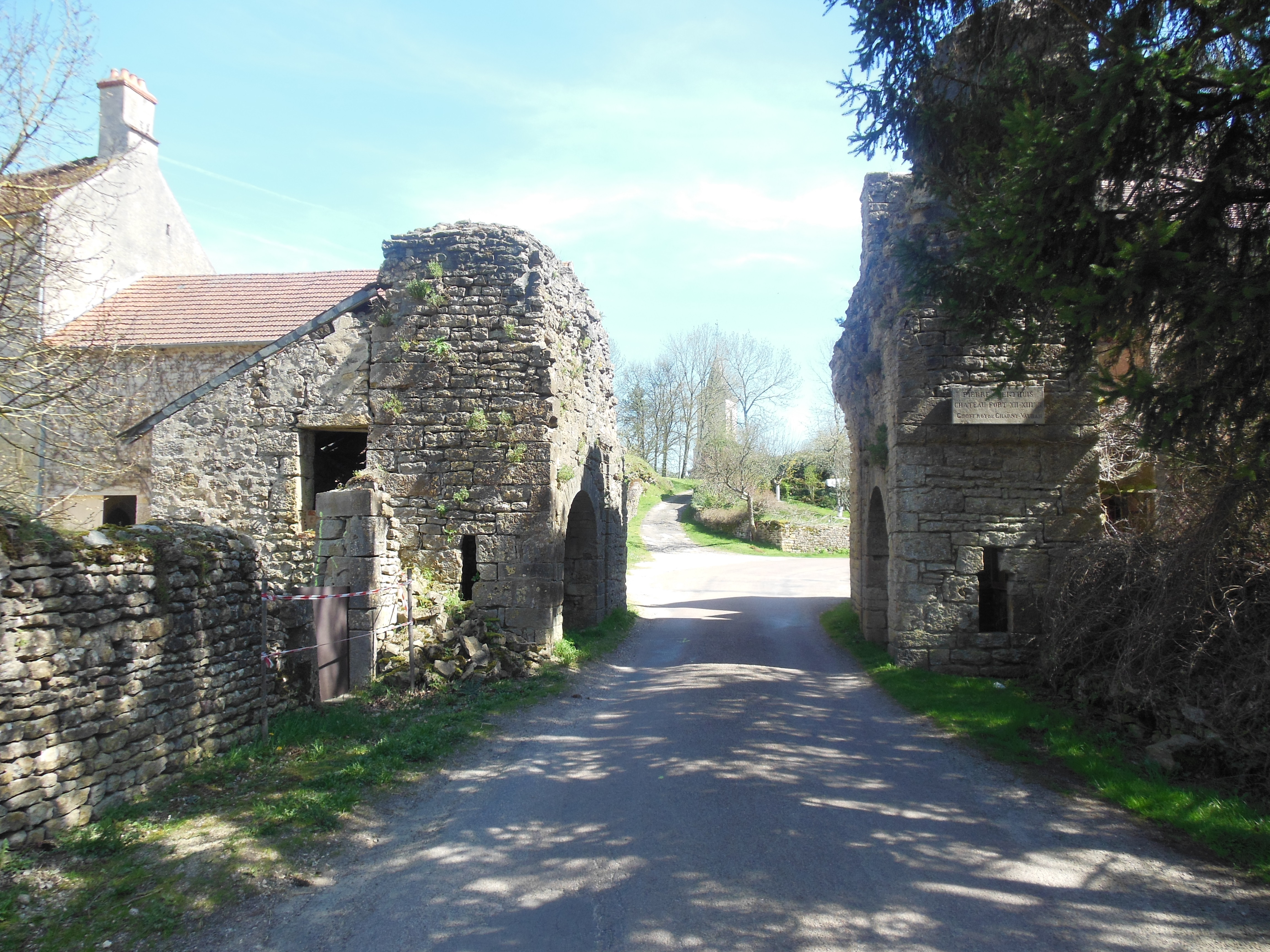 Porte (XIIe-XIIIe s), à Pierre-Perthuis (89).